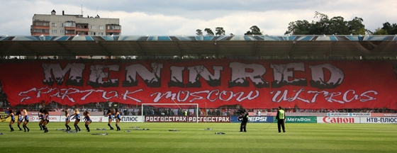 Перфоманс "Men in Red" в Раменском. 2009 год